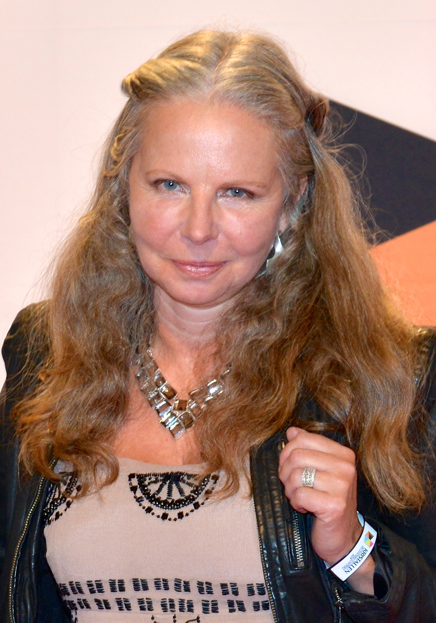 Caroline Giertz på Kristallen-galan 2013.